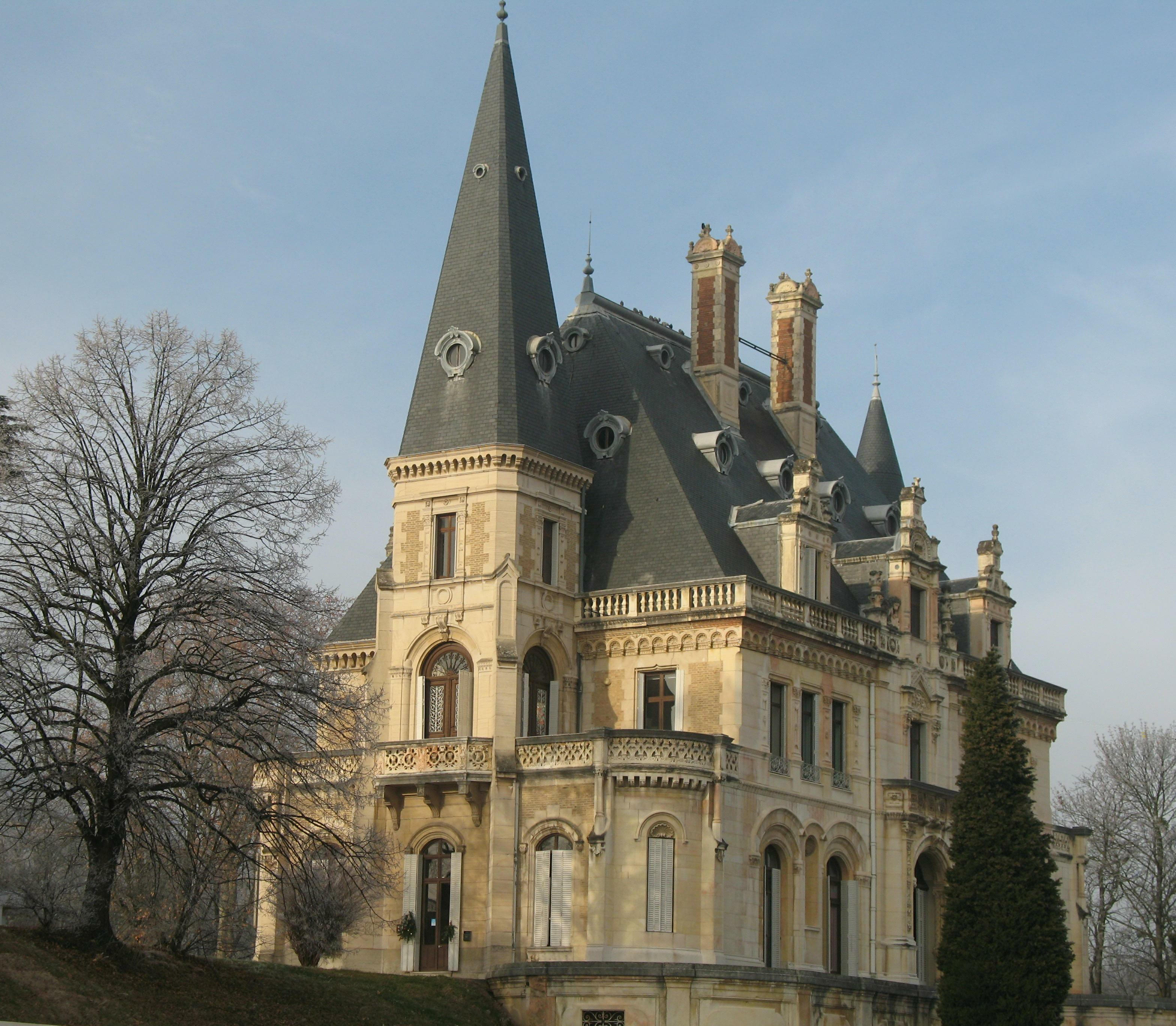 Château-Perret à Collonges-au-Mont-d'Or dans le Rhône